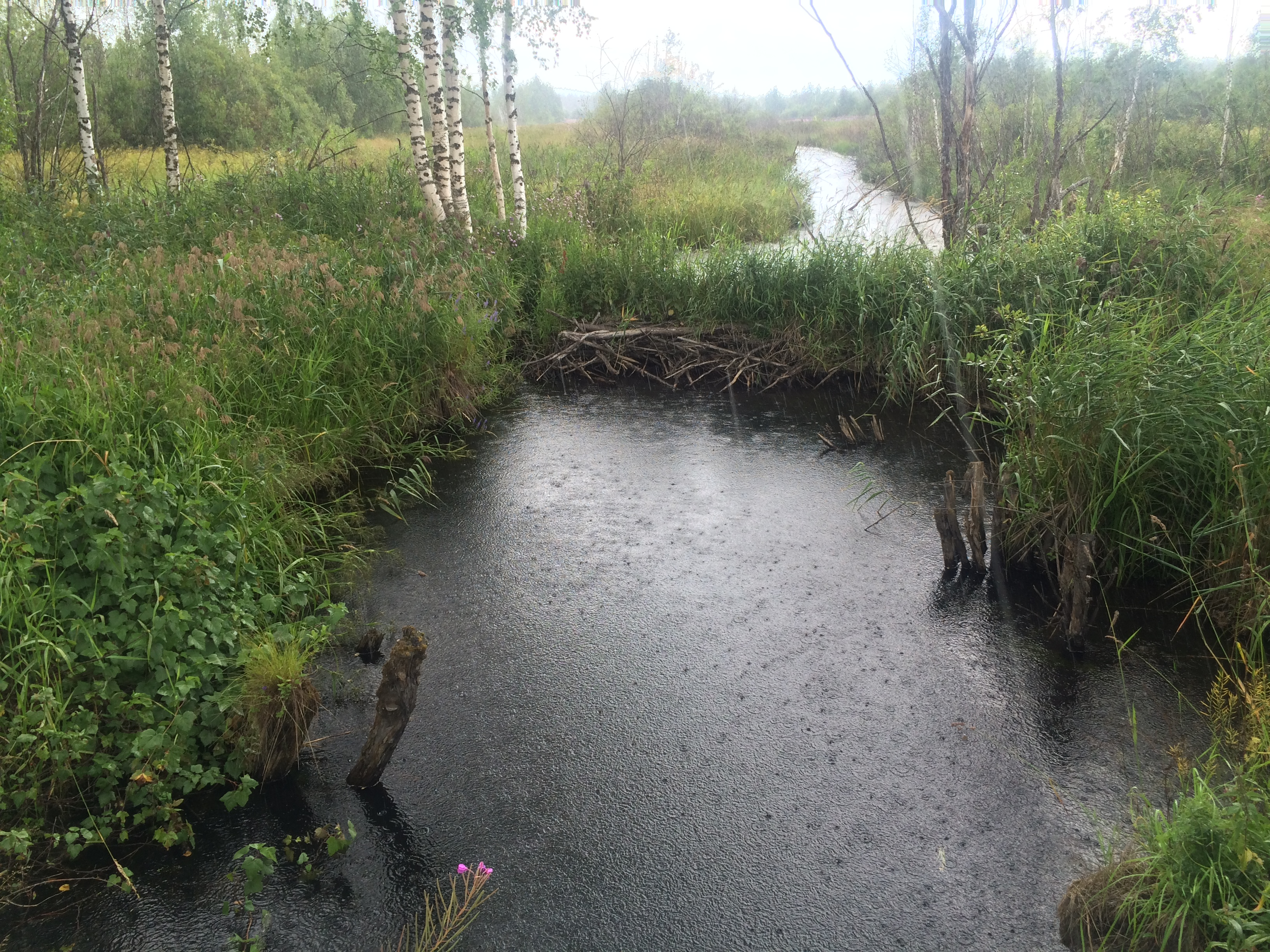 ручей Аза